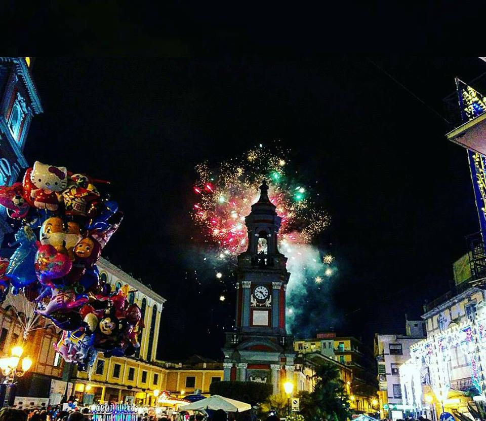 Foto scattata durante la festività di San Sossio in Frattamaggiore(Na) che ritrae l'attimo in cui dietro lo storico campanile si intravedono fuochi d'artificio. Un mix di religiosità e festa in una foto.